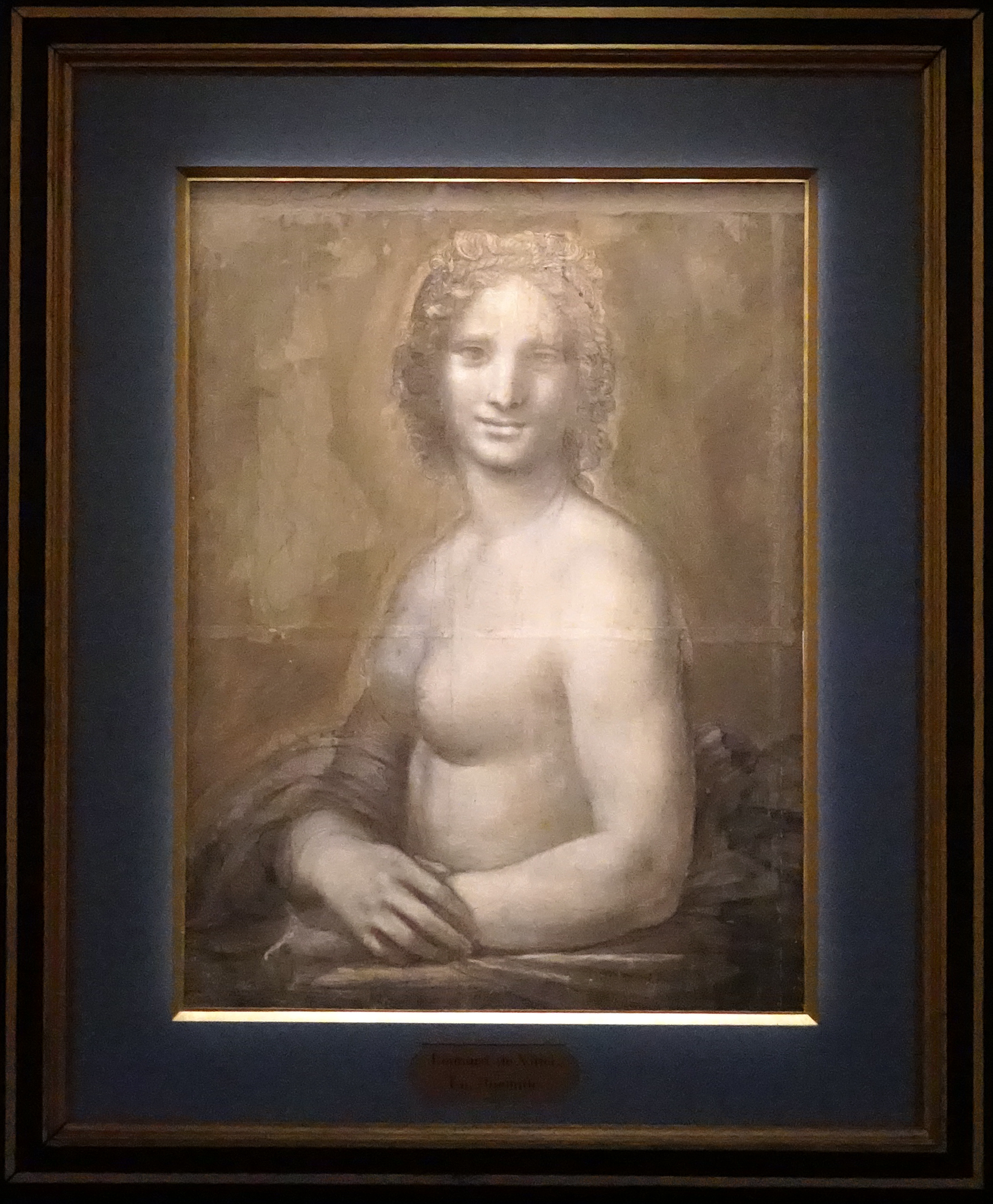 La Joconde nue au Chantilly Arts & Elegance Richard Mille 2019